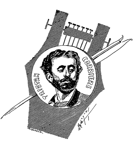 French poet Tristan Corbière (1845-1875) by Manuel Luque (1854-19??)